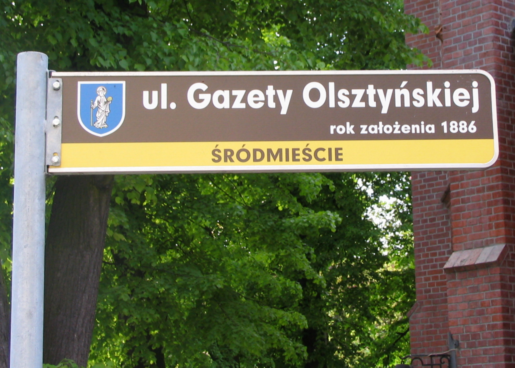 "ul. Gazety Olsztyńskiej rok założenia 1886" w Olsztynie